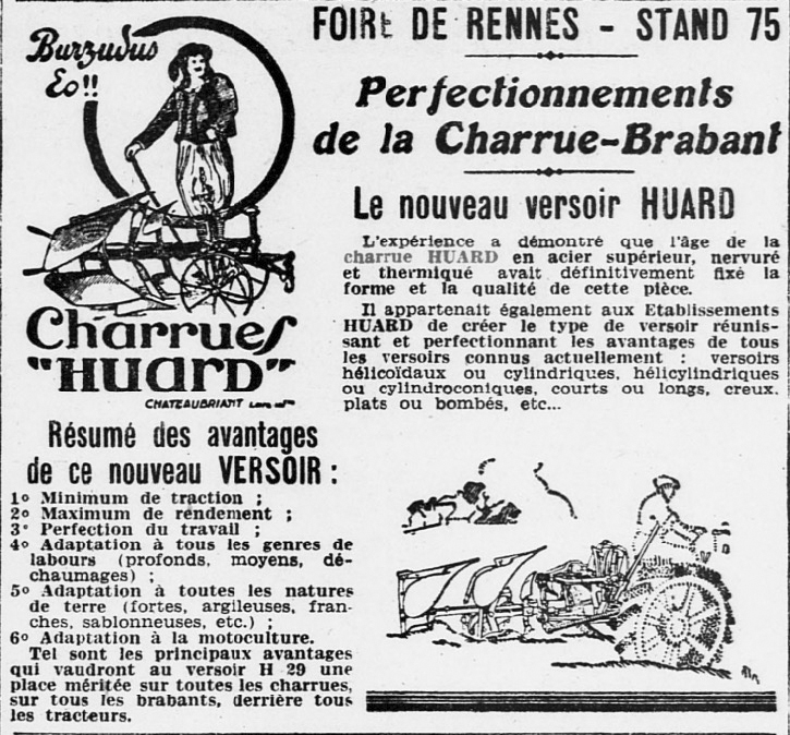 Publicité de l'entreprise Huard, fabricant de charrues à Châteaubriant, pour la Foire de Rennes où elle dispose du stand 75.